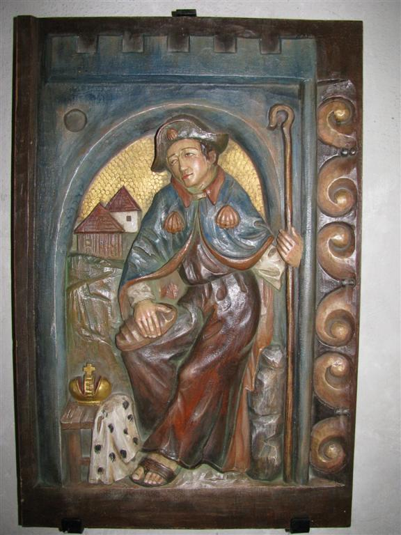 Die bemalte Pilgertafel aus Holz zeigt den Heiligen Rupert mit dem Pilgersymbol, der Jakobsmuschel. Standort: Katholische Pfarrkirche St.Rupertus und St.Hildegard in Bingen-Bingerbrück.